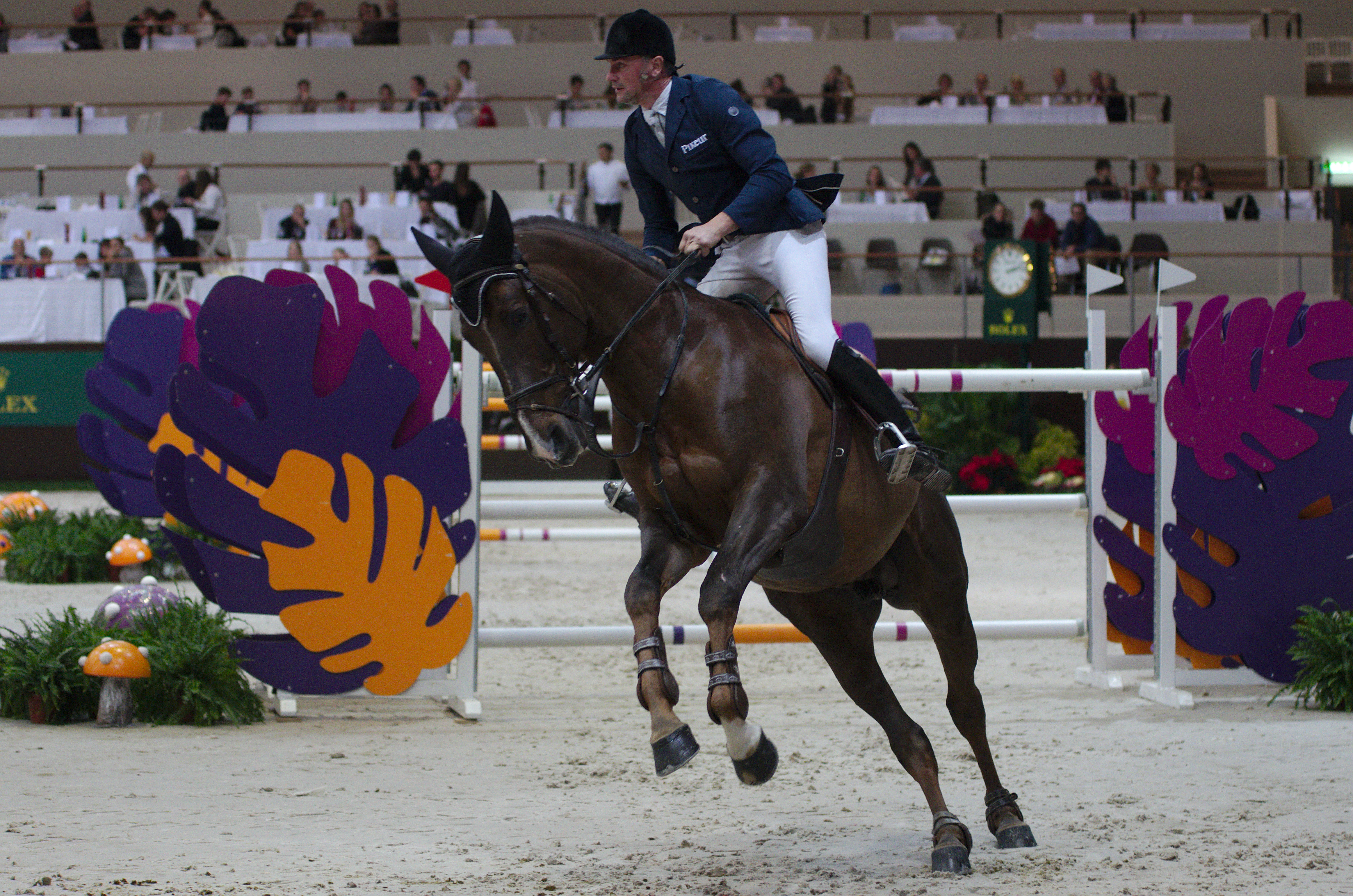 54eme CHI de Genève - 20141213 - Coupe de Genève - Jerome Hurel et Quartz Rouge